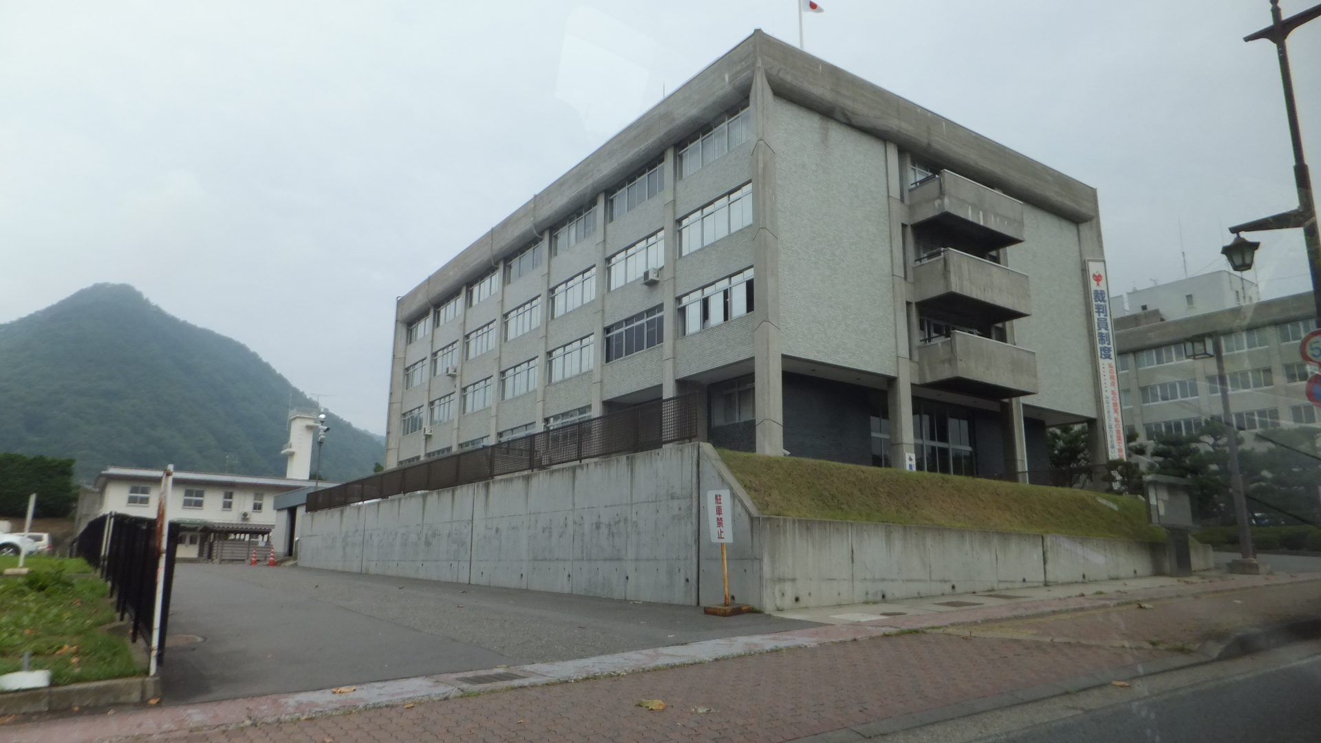 長野地方検察庁